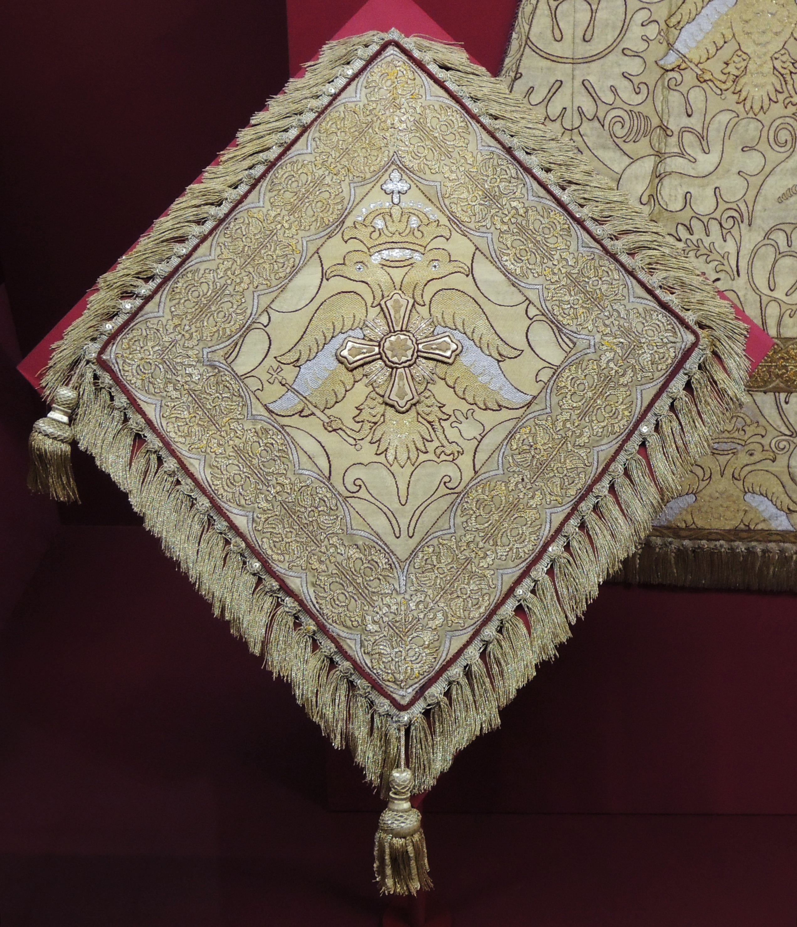 Палица. Москва, фирма А. и В. Сапожниковы. 1896. Золотная парча, шелк, галун. Являются частью большого комплекса парадных богослужебных облачений, выполненных для духовенства Успенского собора к коронации Николая II.